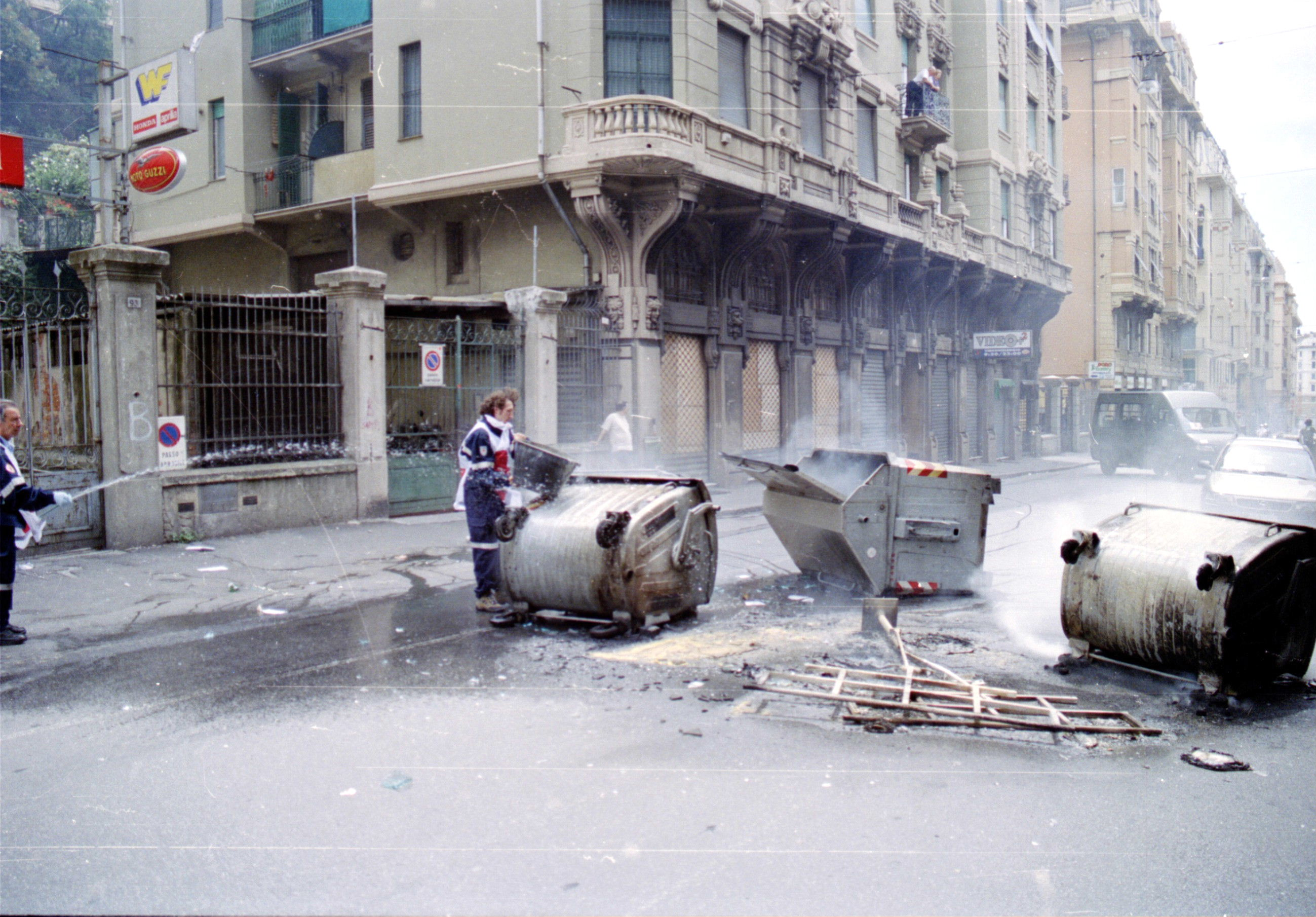 Genova - Fatti del G8 del 20 luglio 2001 Bidoni della spazzatura rovesciati in Via Montevideo